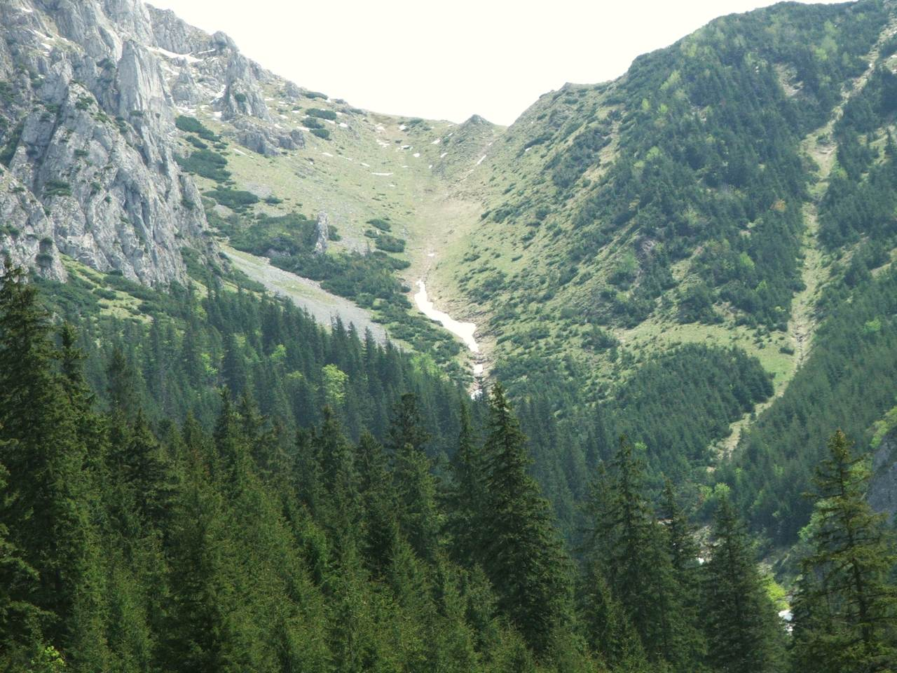 Widok na wschód z Polany Pisana. Żleb nad Pisaną